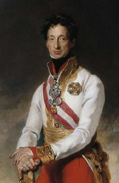 cropped